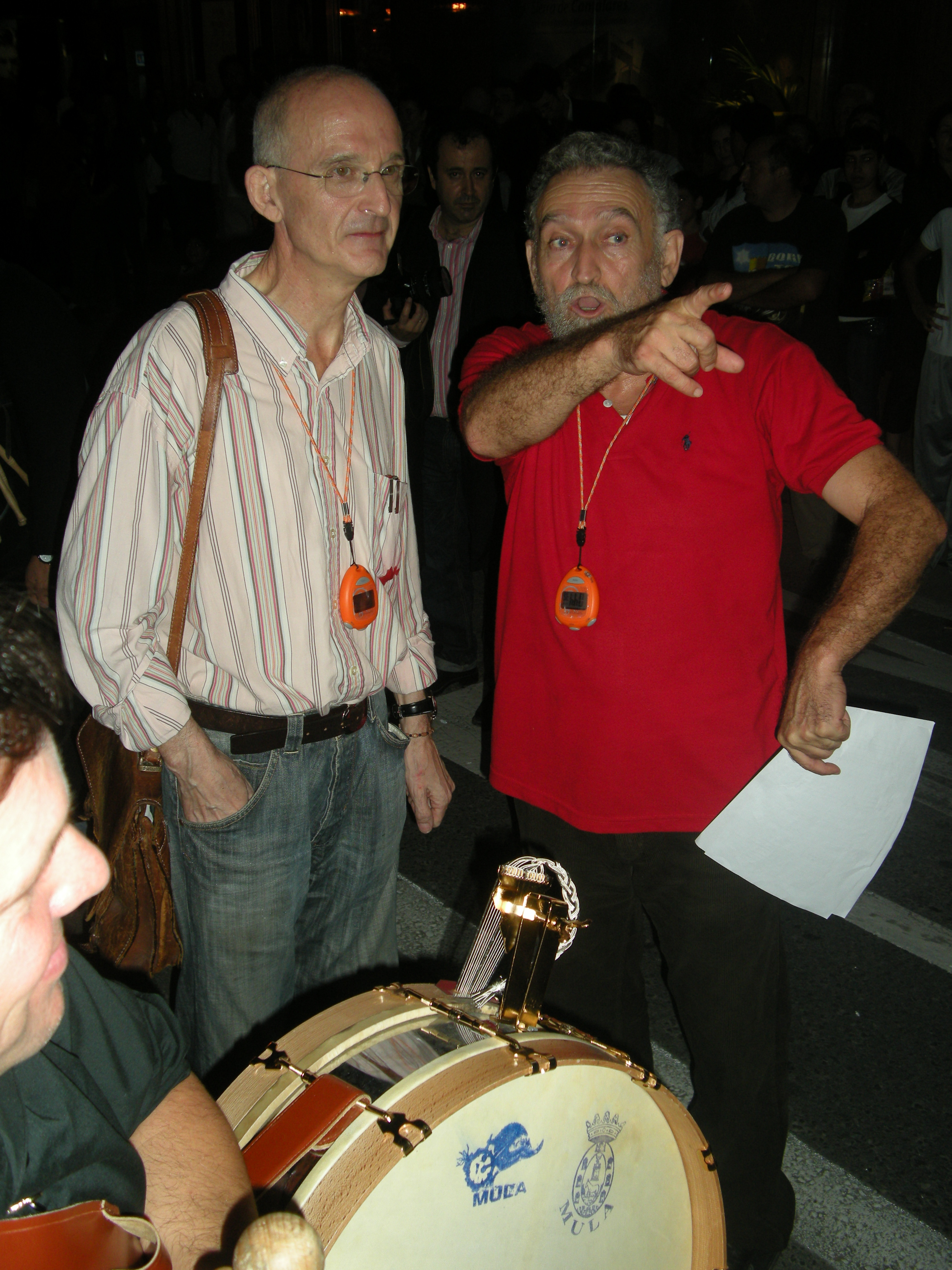 Enrique Máximo (izquierda) junto con Llorenç Barber (derecha) durante el concierto "La Gran Vía. Una parábola del S.XX". 12/10/2008.